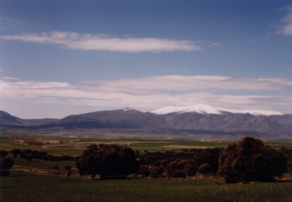 La Serrota 2294 m. desde la Sierra de Ávila. España